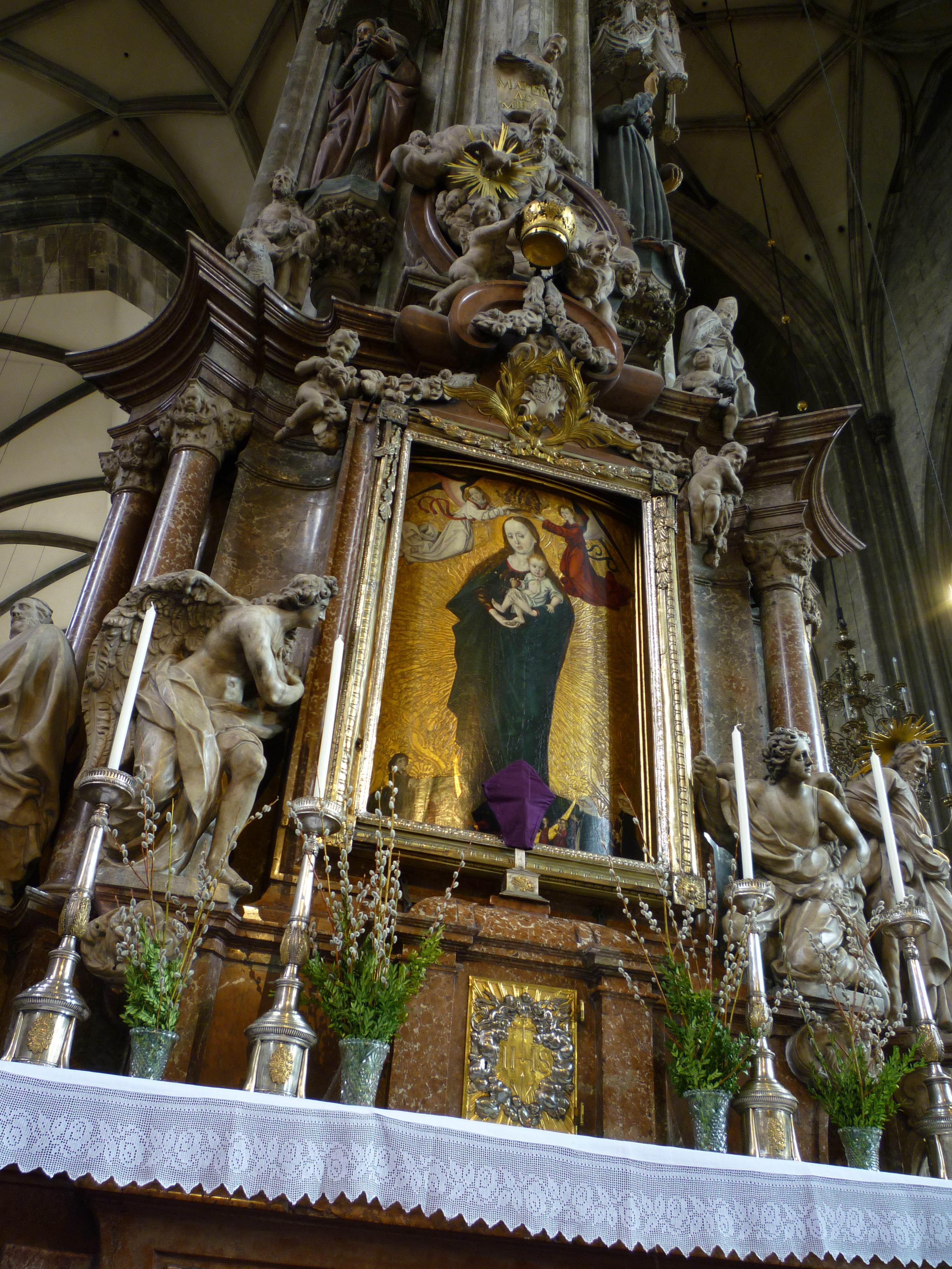 Frauenaltar im Wiener Stephansdom